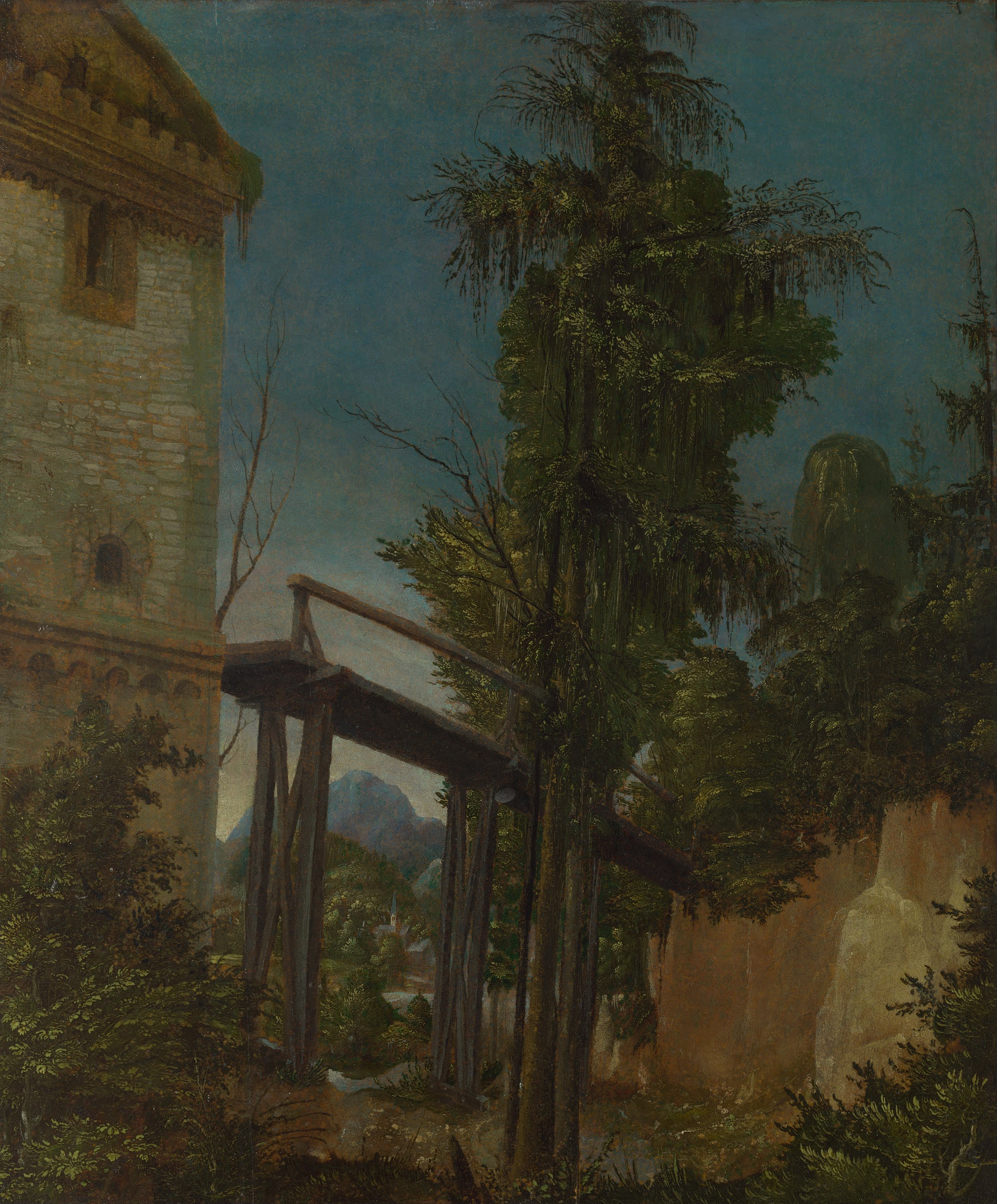 Village under bridge: Golling, Salzburg, Austria